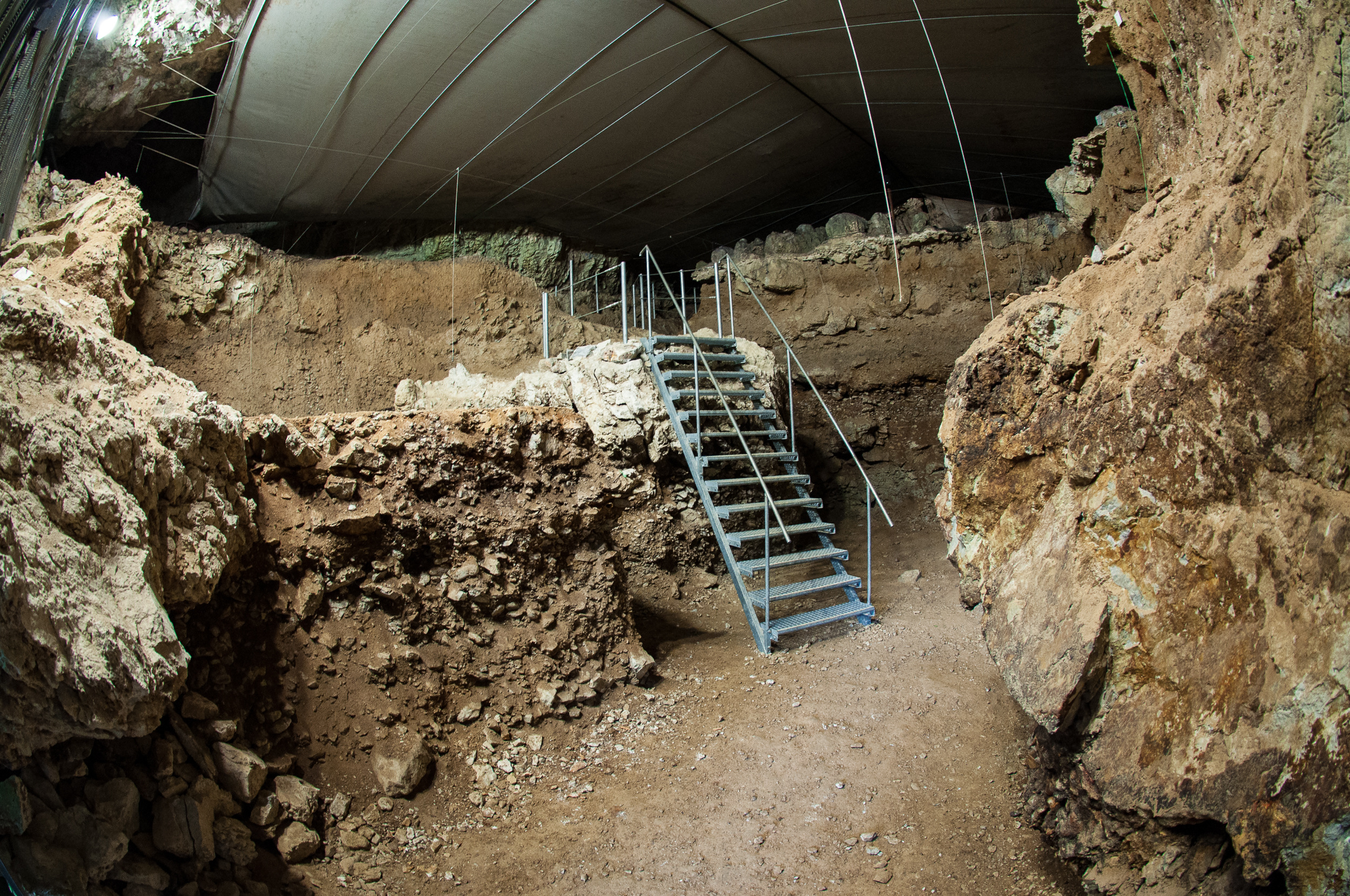 Grabungsstelle in der Höhle Divje Babe I bei Šebrelje, Idrija, Slowenien.